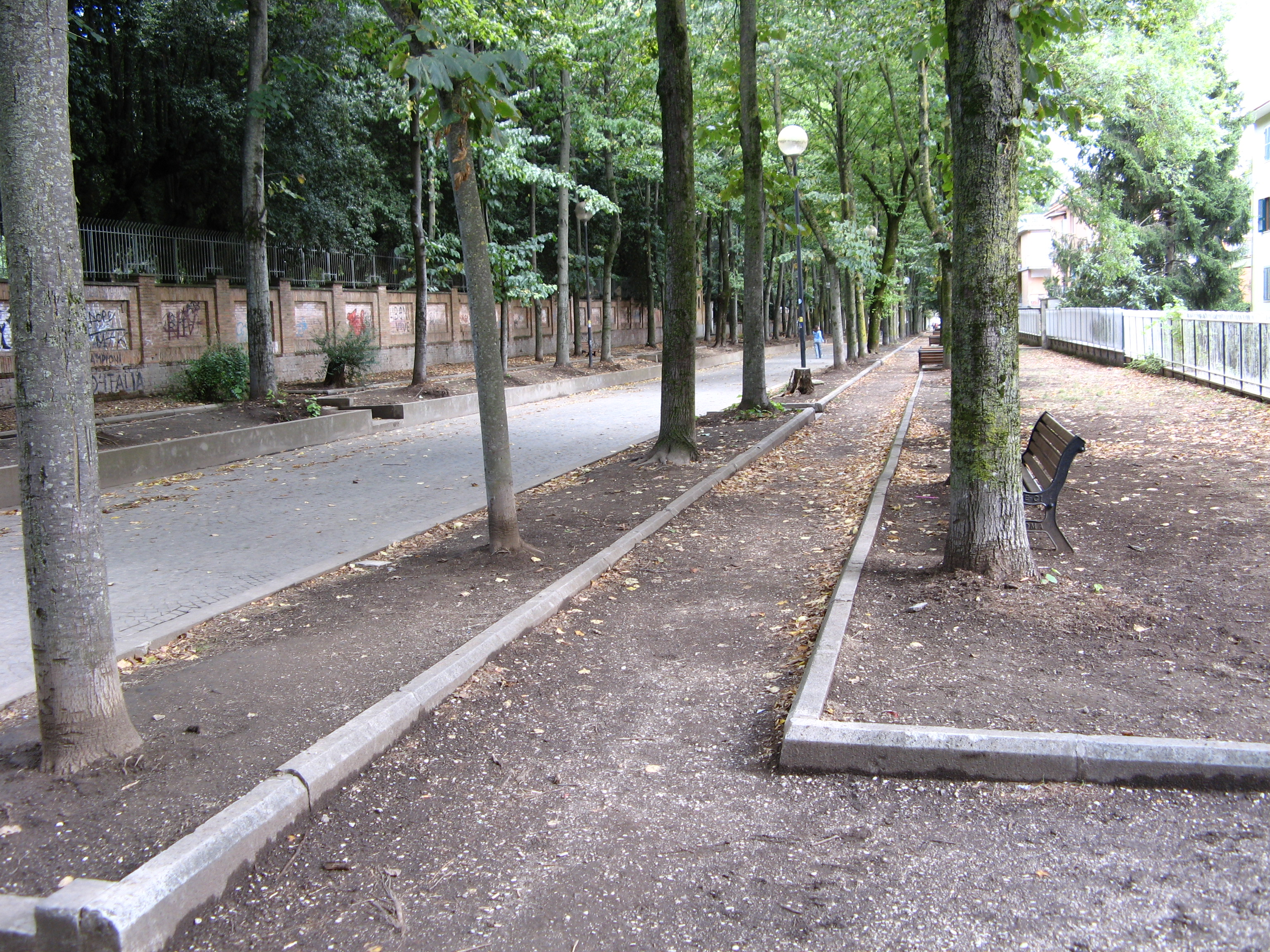 Genzano di Roma, Olmata